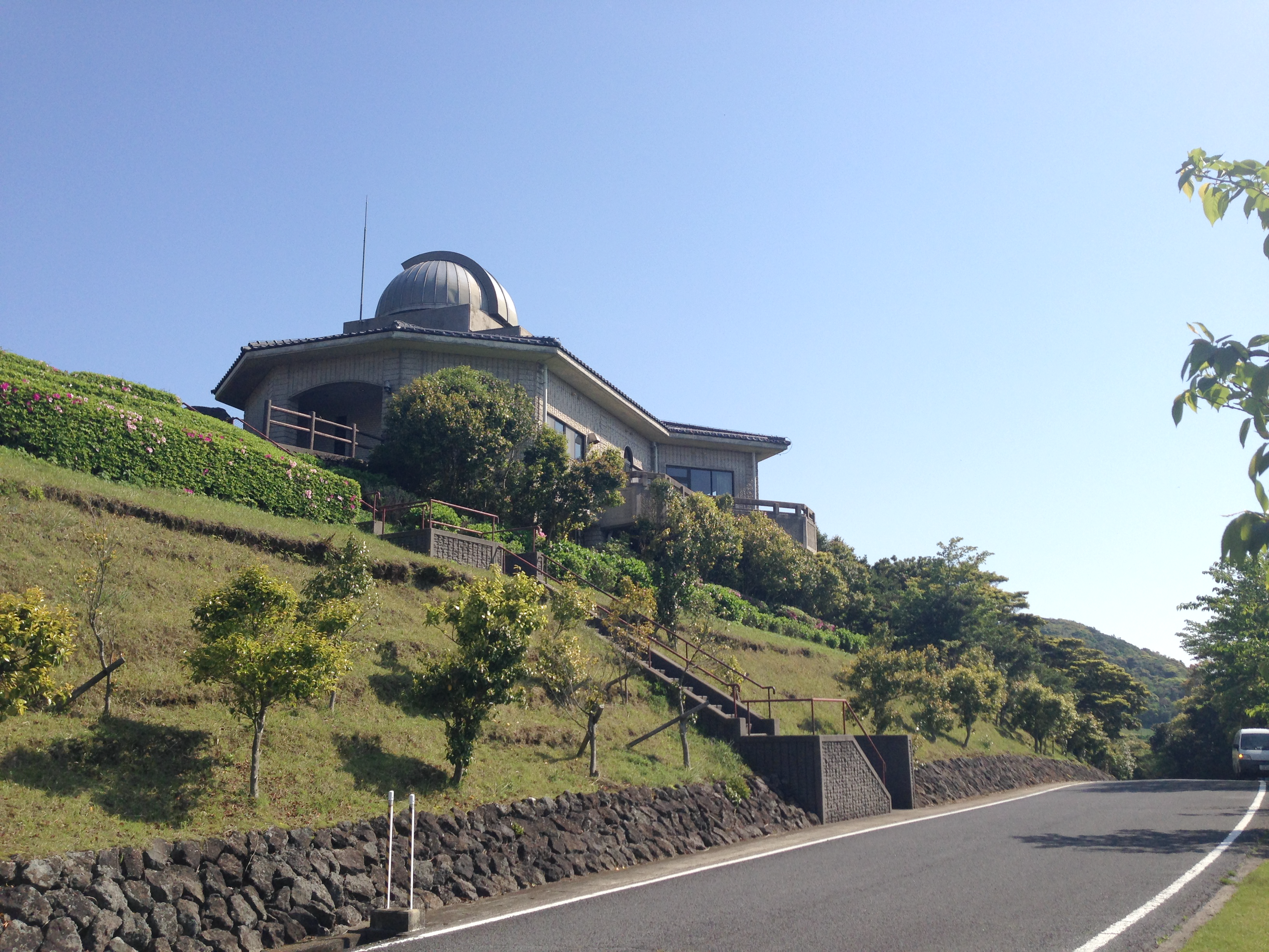 長崎県五島市（五島列島福江島）-鬼岳天文台